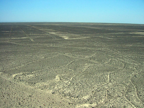 Nazca-Linien/Peru vom Aussichtsturm Maria Reiches an der Panamericana. andere Versionen